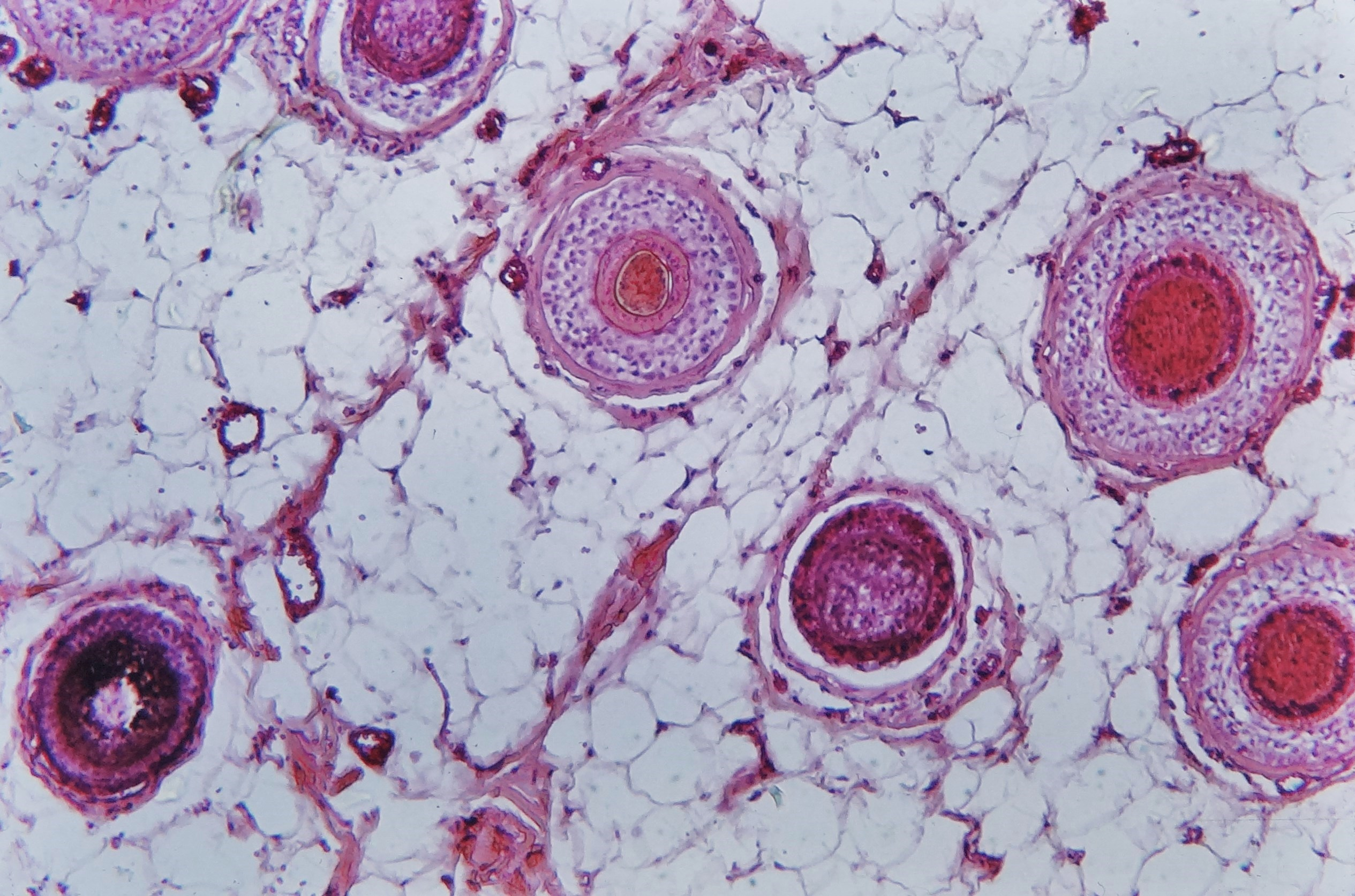 Der histologische Schrägschnitt der menschlichen Kopfhaut zeigt in unterschiedlicher Höhe geschnittene Haarfollikel